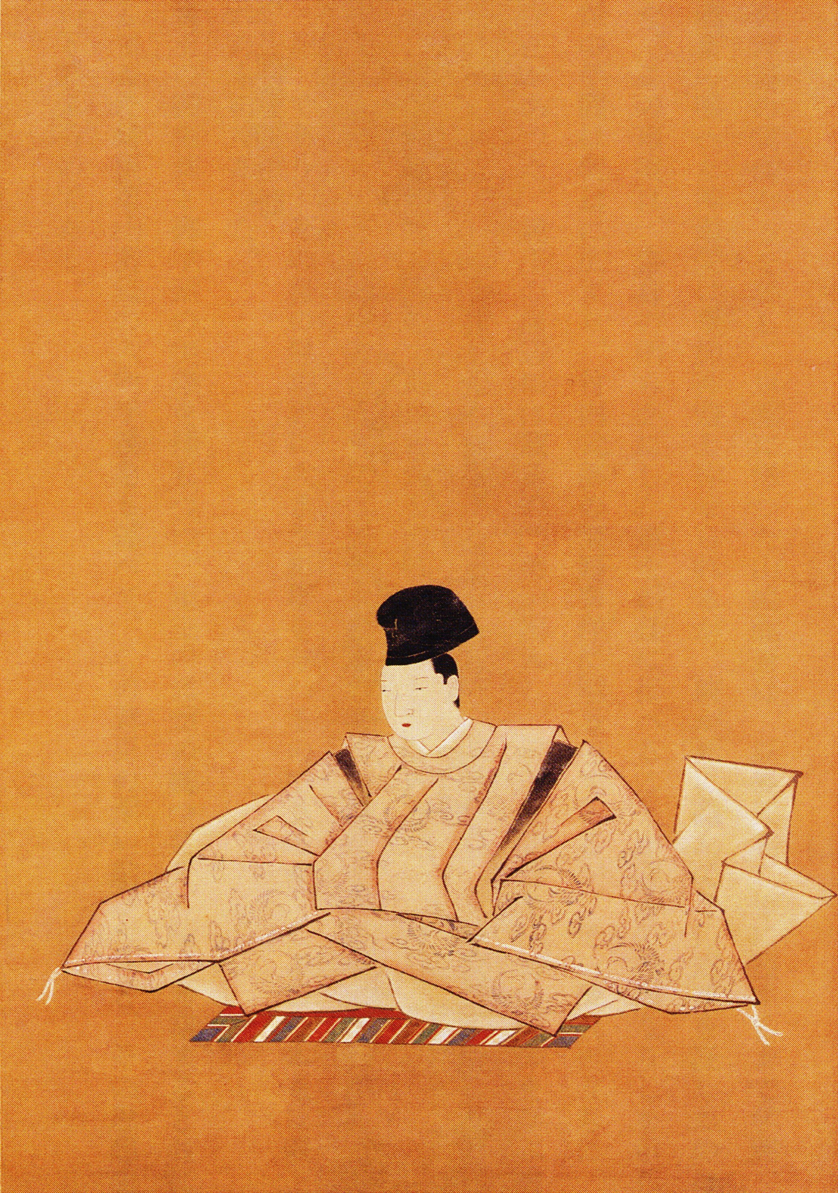 八条宮尚仁親王の肖像。